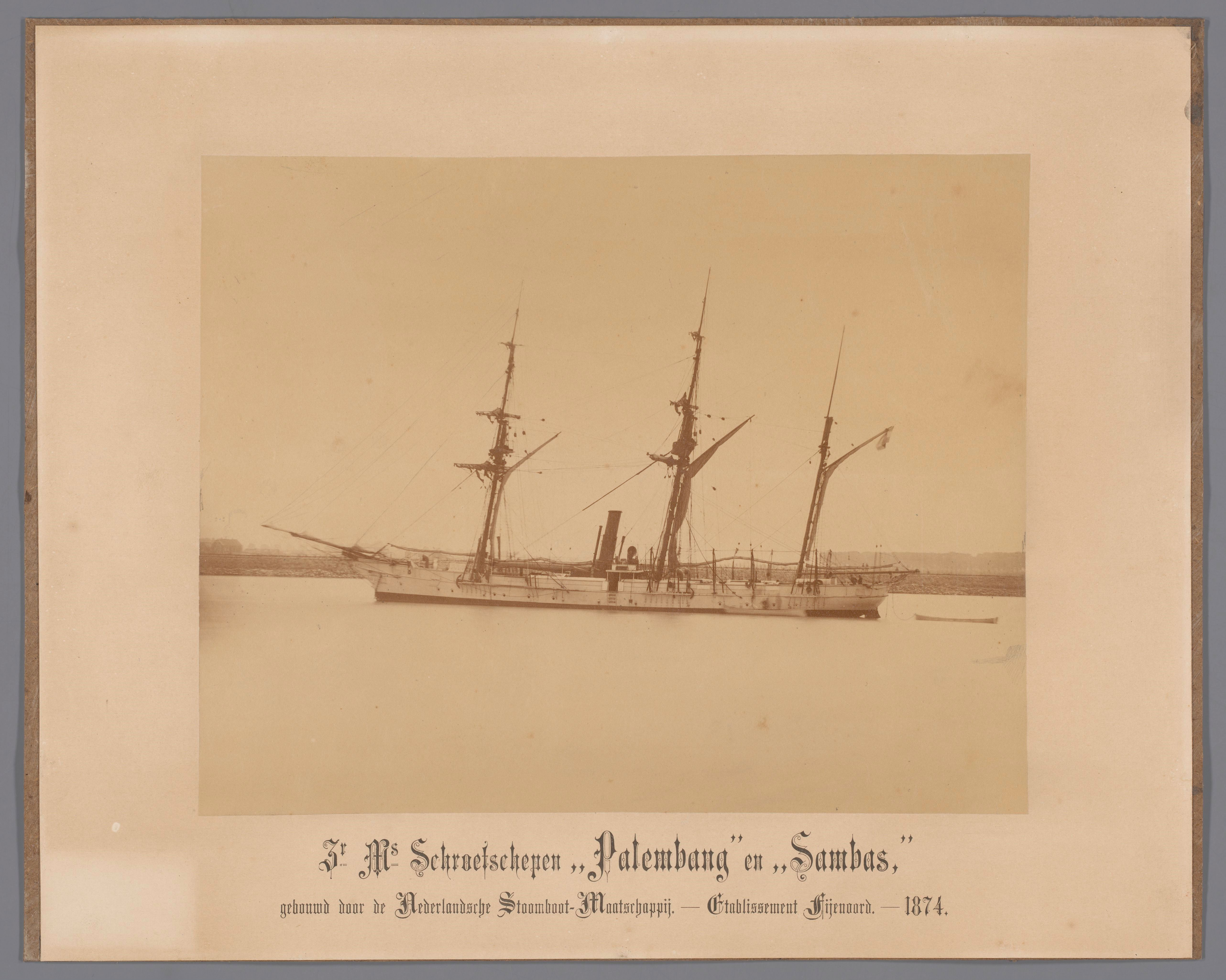 IdentificatieTitel(s): Zr. Ms. Schroefschepen 'Palembang' en 'Sambas' (titel op object)Objecttype: foto Objectnummer: NG-MC-1331Opschriften / Merken: opschrift, midden onder: ‘Zr Ms Schroefschepen ‘Palembang’ en ‘Sambas,’ / gebouwd door de Nederlandsche Stoomboot-Maatschappij. - Etablissement Fijenoord. - 1874.’Omschrijving: Schroefstoomschip 4de klasse gezien op de bakboordzijde. Het gefotografeerde schip is de Palembang of de Sambas.VervaardigingVervaardiger: fotograaf: anoniemPlaats vervaardiging: NederlandDatering: 1874Fysieke kenmerken: papierMateriaal: papier Techniek: fotografieAfmetingen: h 36,7 cm. × b 44,3 cm. ToelichtingDe Palembang en de Sambas, lang 42 m., werden in 1873-1874 gebouwd door de Nederlandsche Stoomboot Maatschappij Etablissement Fijenoord in Rotterdam voor dienst in Oost-Indië; compsietbouw. De Palembang werd in 1888 verkocht, de Sambas in 1896.OnderwerpWie: Palembang (schip)Sambas (schip)Verwerving en rechtenVerwerving: overdracht van beheer 1883Copyright: Publiek domein